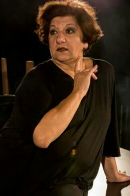 Atriz de TV, teatro e cinema, brasileira